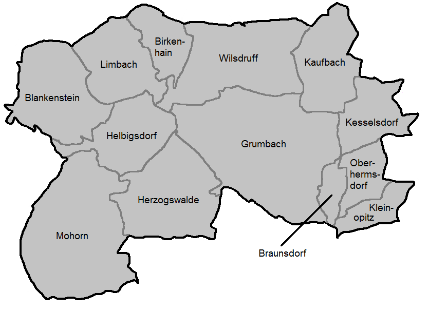 Lageplan von Gemarkungen in Wilsdruff